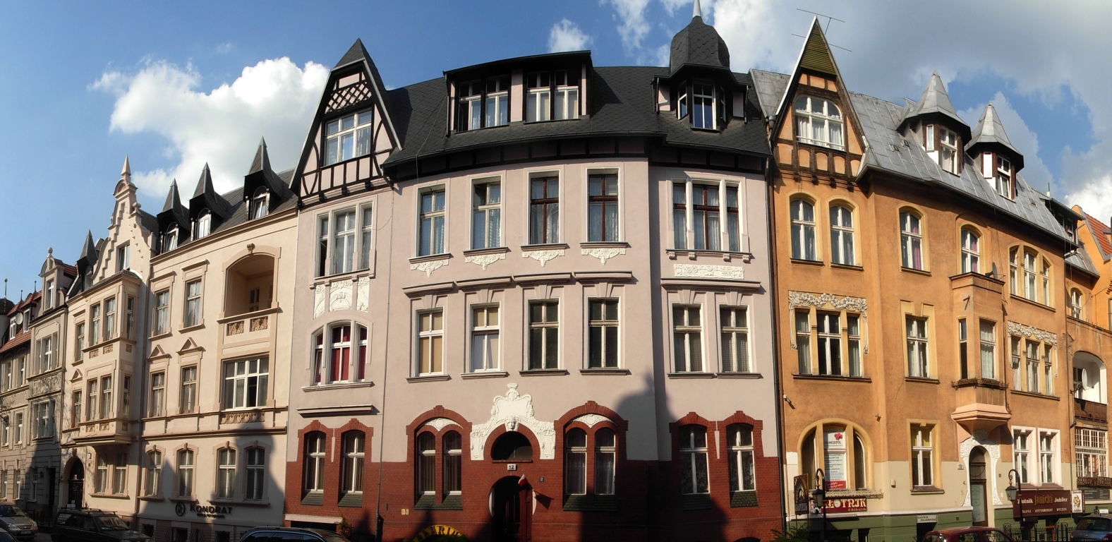 Kamienica ul. Cieszkowskiego 12 Bydgoszcz